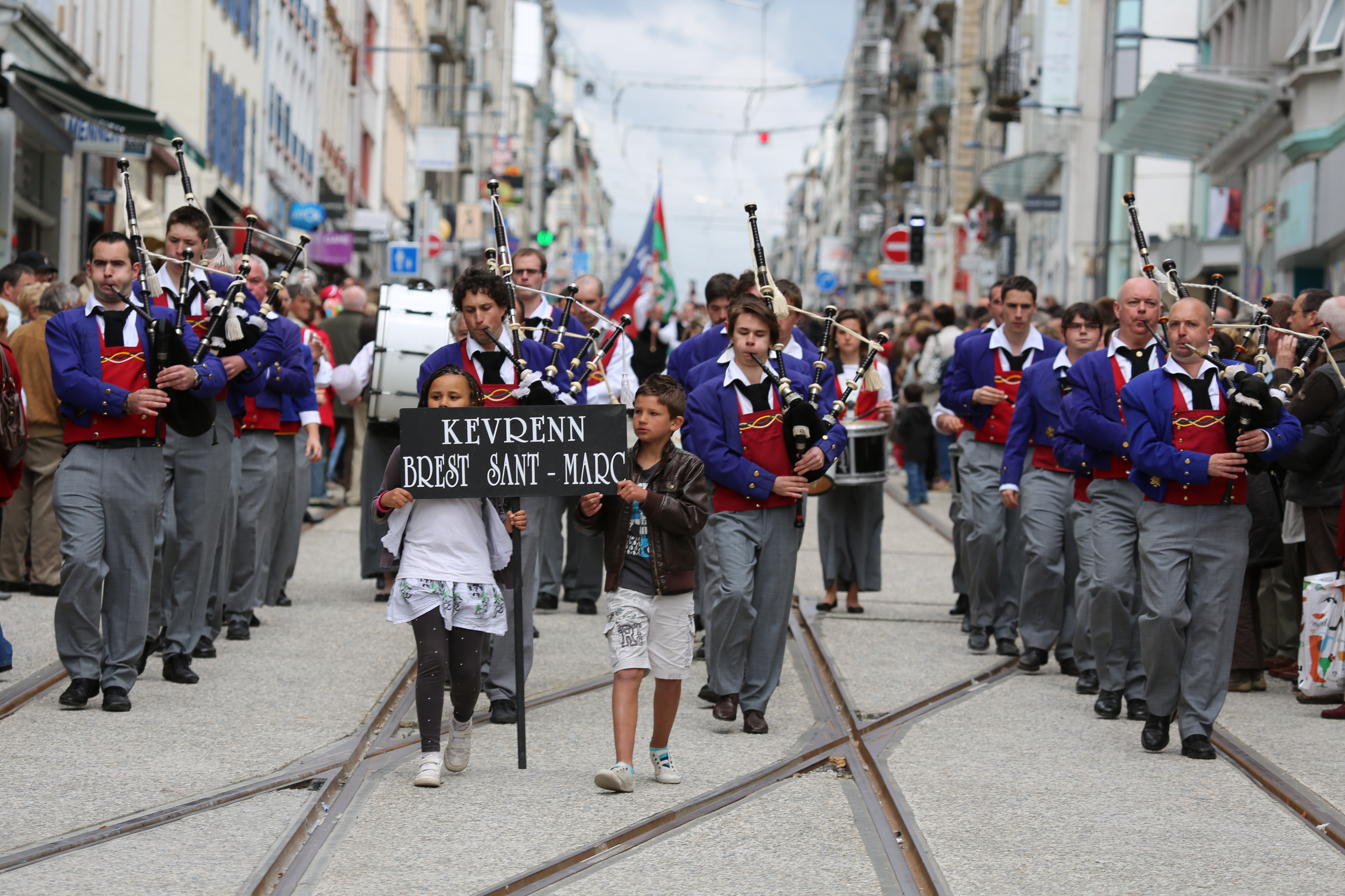 Photo de la parade du printemps des sonneurs le 19 mai 2012 à Brest